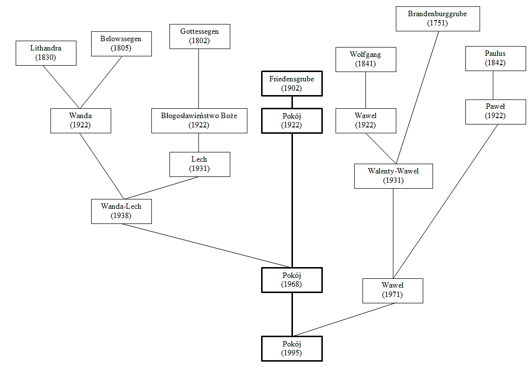 Abstammung und Fusionen des Bergwerks Pokój